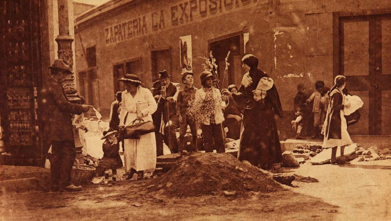 Impresiones fotográficas. "Cual de las dos me gusta mas"